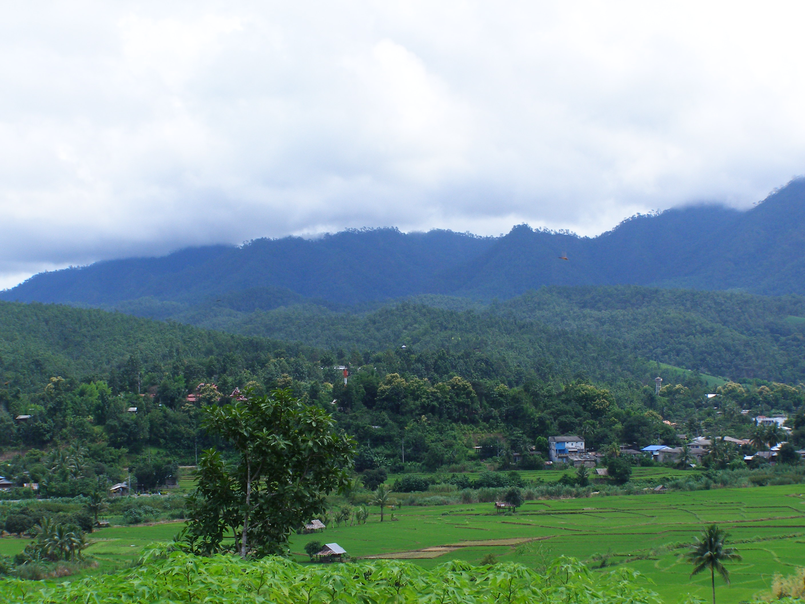 Khung cảnh tuyệt đẹp vùng núi Mae Hong Son do Liftold chụp.